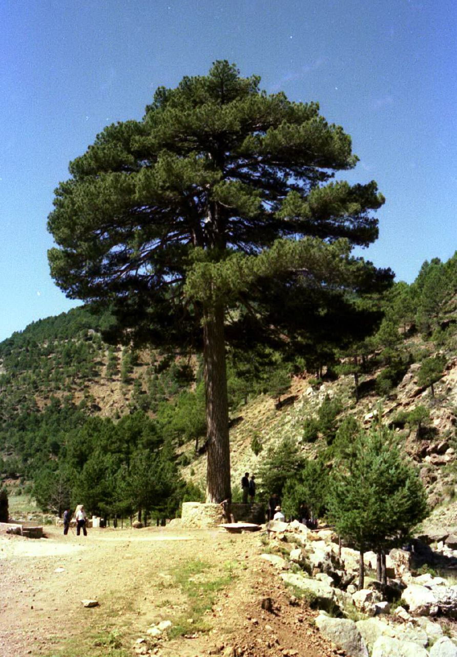 Pinus nigra